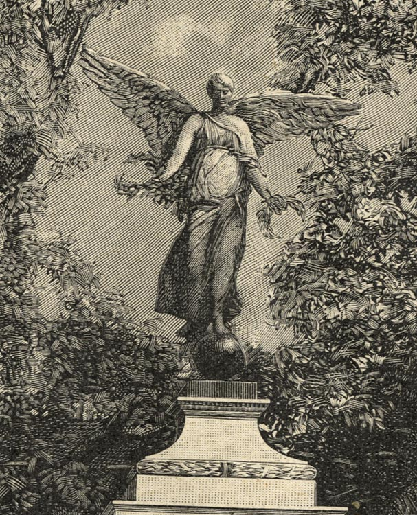 Detail eines Holzstichs zum Karl-Olga-Denkmal in Stuttgart